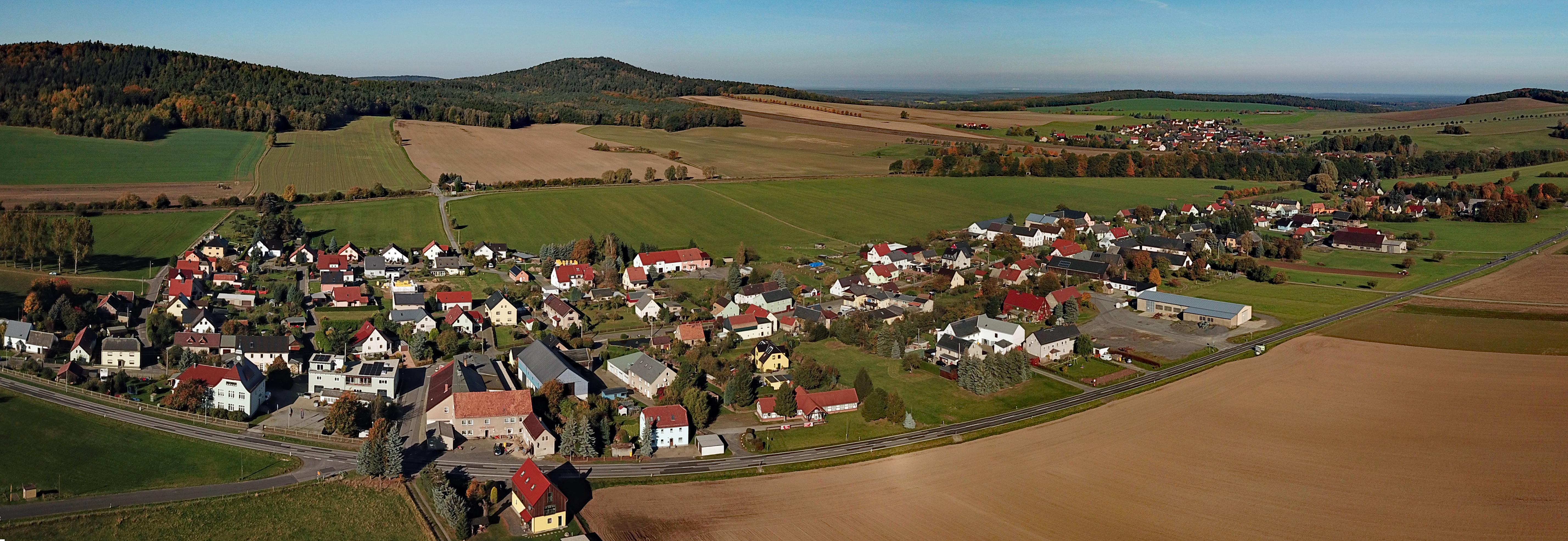 Gelenau (Kamenz) aus der Luft (Panorama, Blick nach Nordwesten)